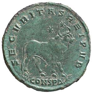 Maiorina di bronzo, gr. 7,86 rappresentante il toro Apis, due stelle e due rami. Iscrizione: R/ SECVRITAS REIPVB. CONS P Δ